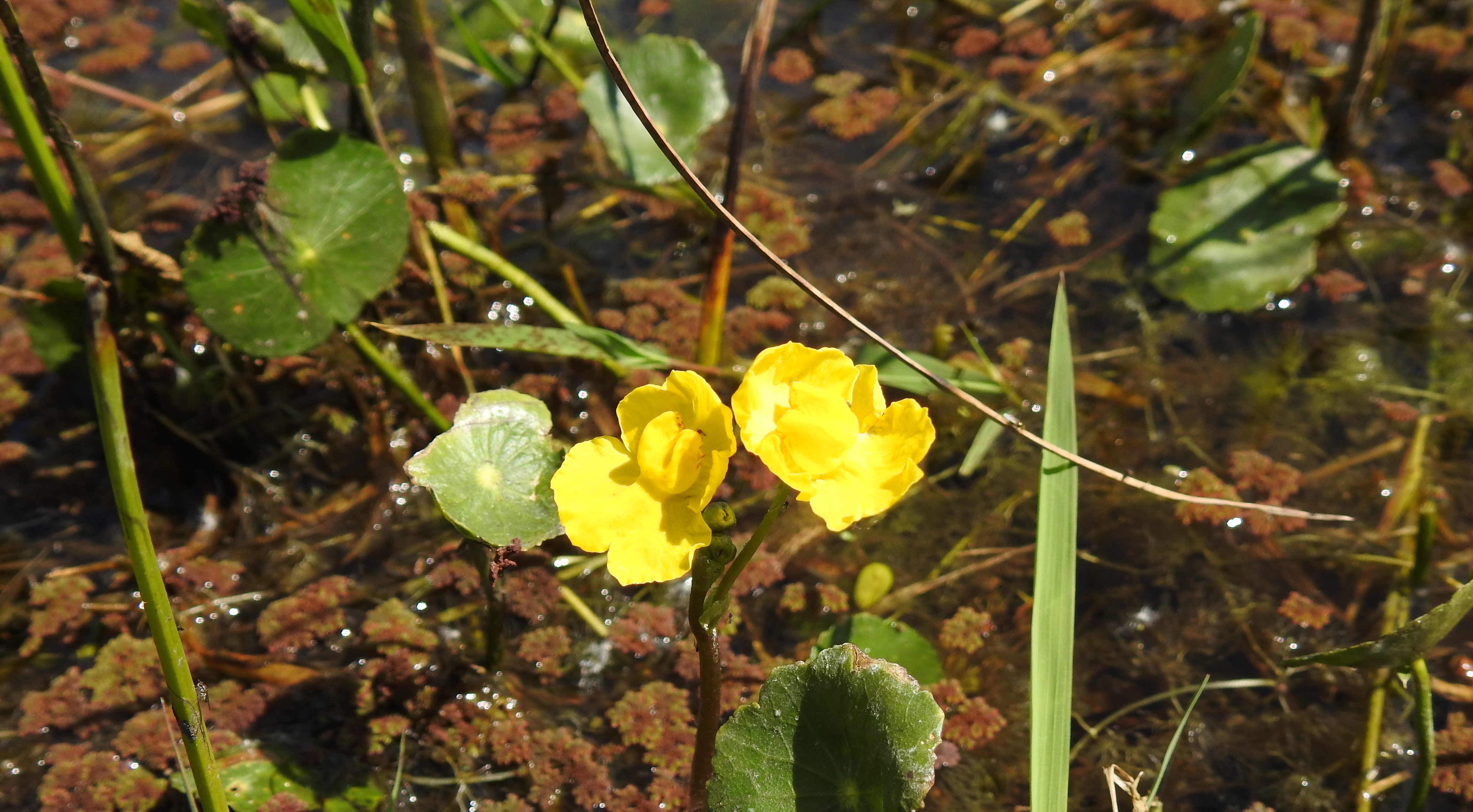 Flor de u. platensis en la provincia de Buenos Aires, Argentina